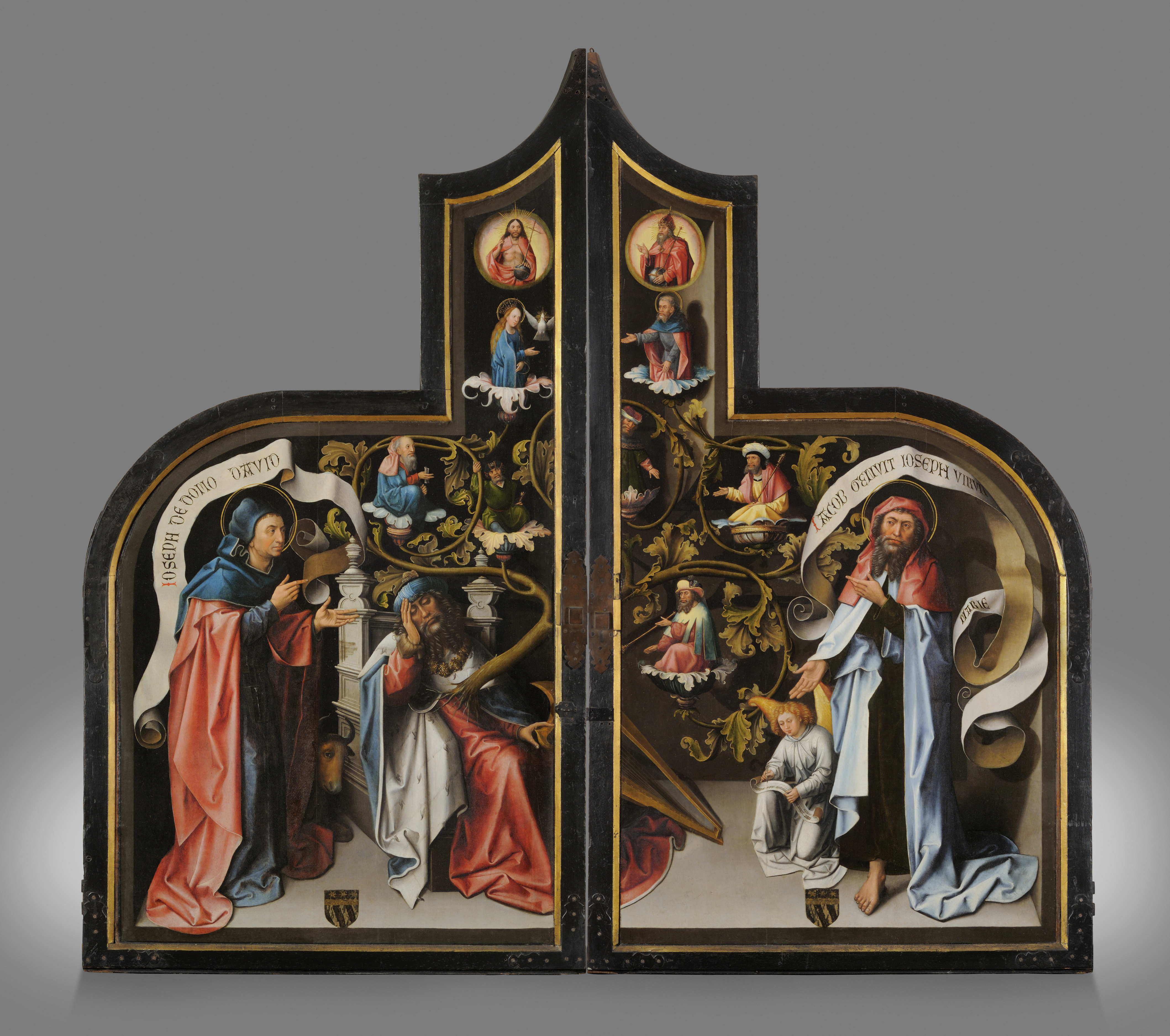 Retable de Saluces. Volets peints.(extérieur)